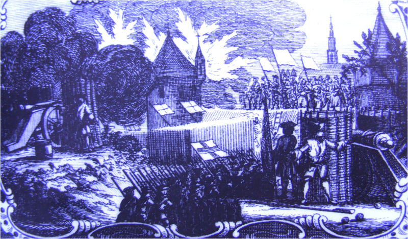 Aalterpoort, beleg door Prins Maurits Bredevoort